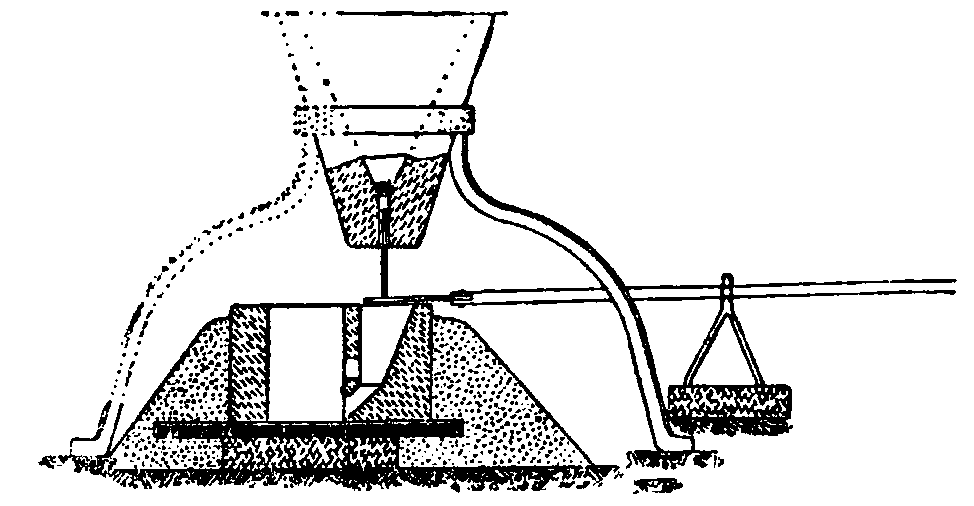 Тигль для алюминотермической сварки